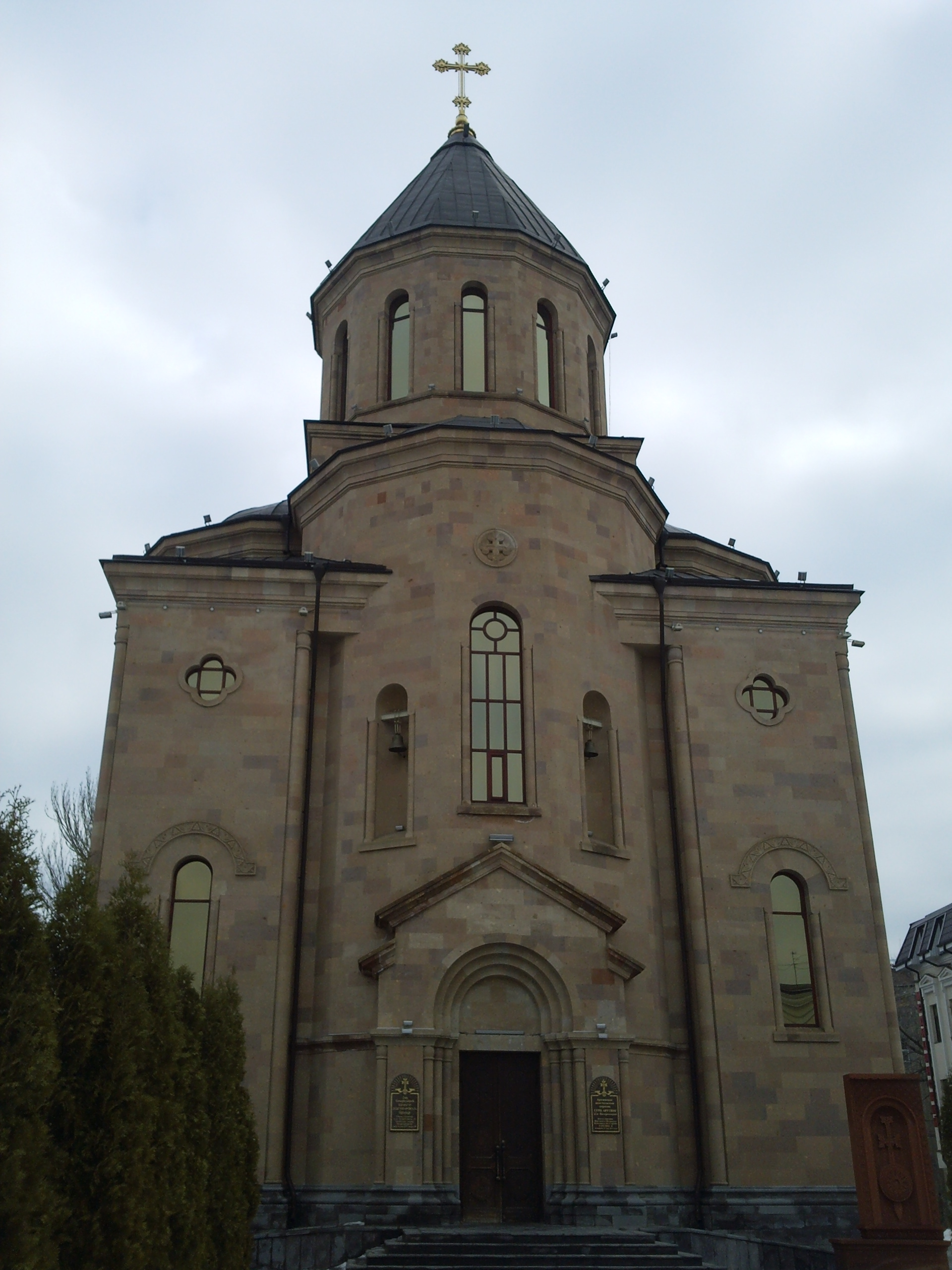 Армянская Апостольская Церковь Сурб Арутюн - это красивая церковь армянской христианской общины, расположенная в Ростове-на-Дону. Также эта церковь имеет название Храм Святого Воскресения. Снаружи храм отделан розовым туфом, который специально доставляли из Армении. Освящение церкви было произведено 29 мая 2011 году Католикосом Гарегином Вторым.